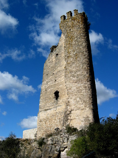 Castell de Sta. Perpetua de Gaià a la comarca de la Conca de Barberà - Catalunya